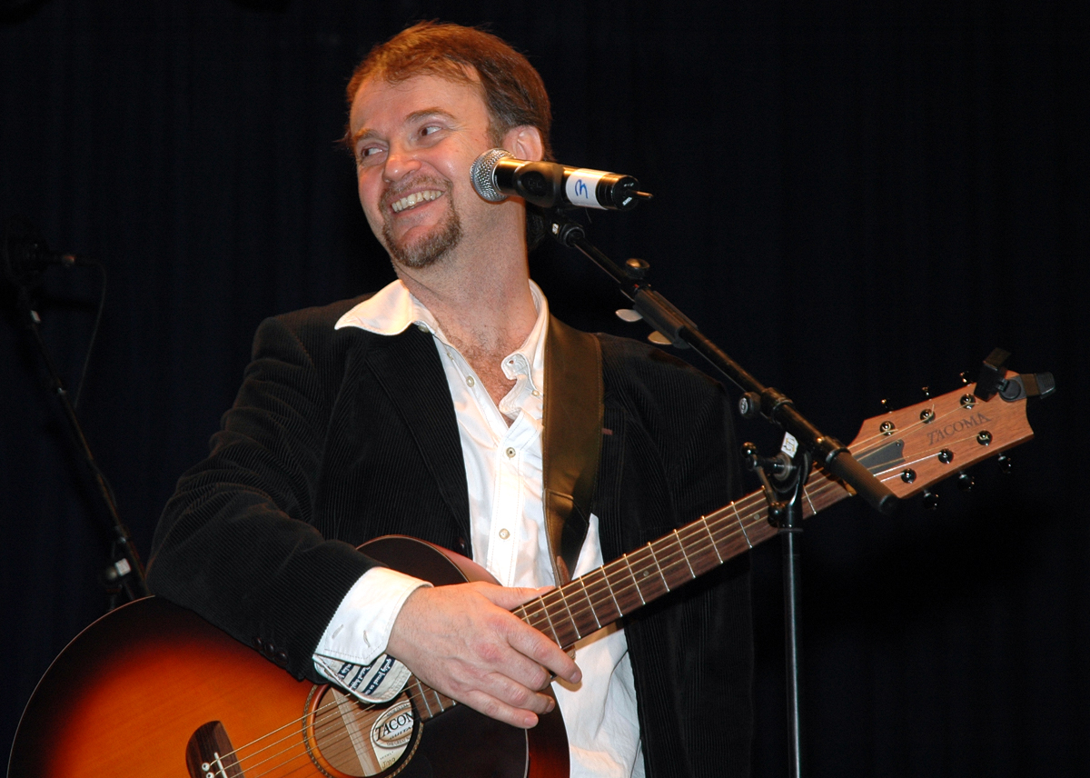 Pat Fritz bei seinem Auftritt auf der Internationalen Kulturbörse in Freibug 2012